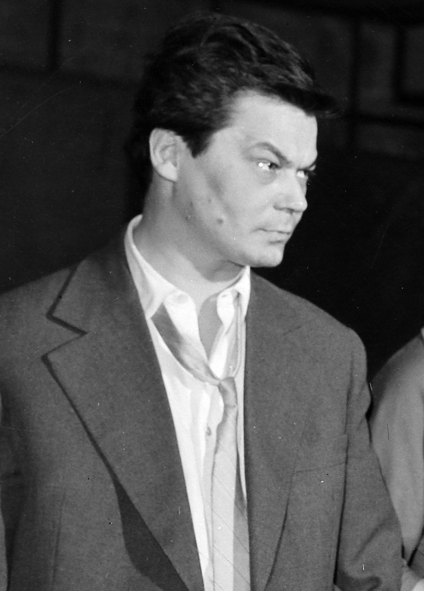 Szatmáry István magyar színész.